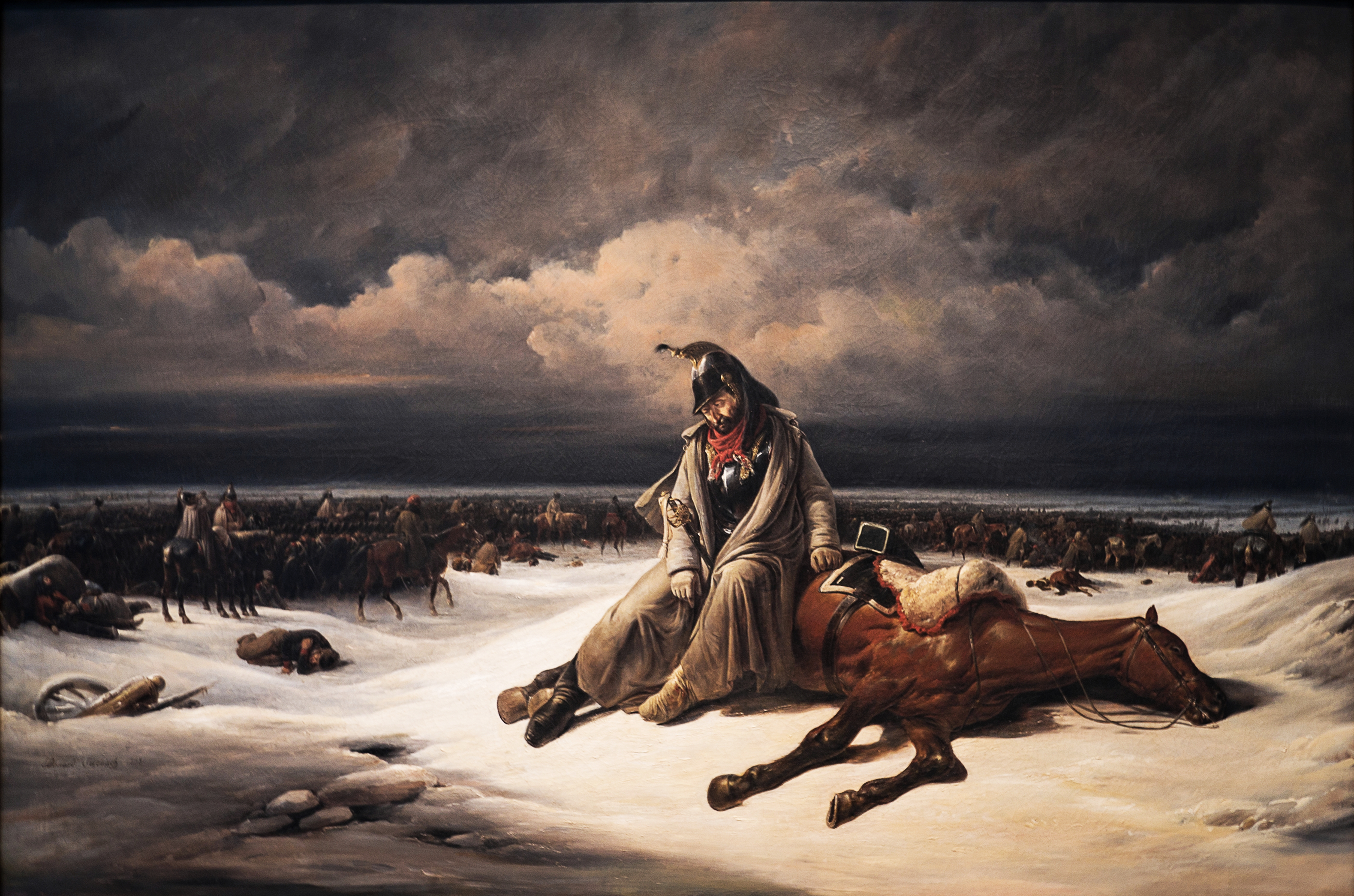 Retraite de Russie - Bernard-Edouard Swebach - Exposition Les désastres de la guerre 1800-2014 - Musée Louvre-Lens. Prêt du musée des beaux-arts de Besançon.